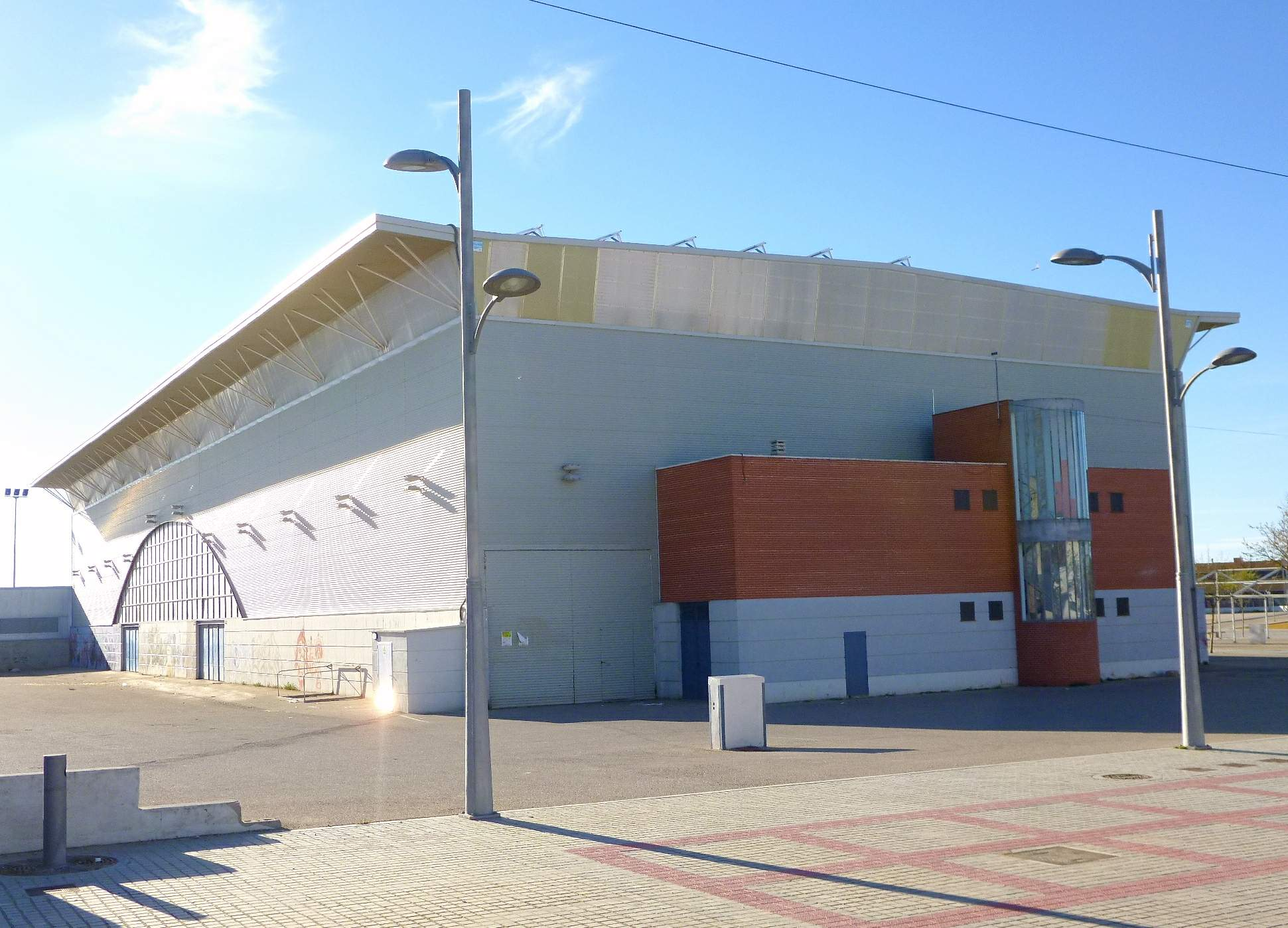 Auditorio Municipal de Villarrobledo (Albacete)